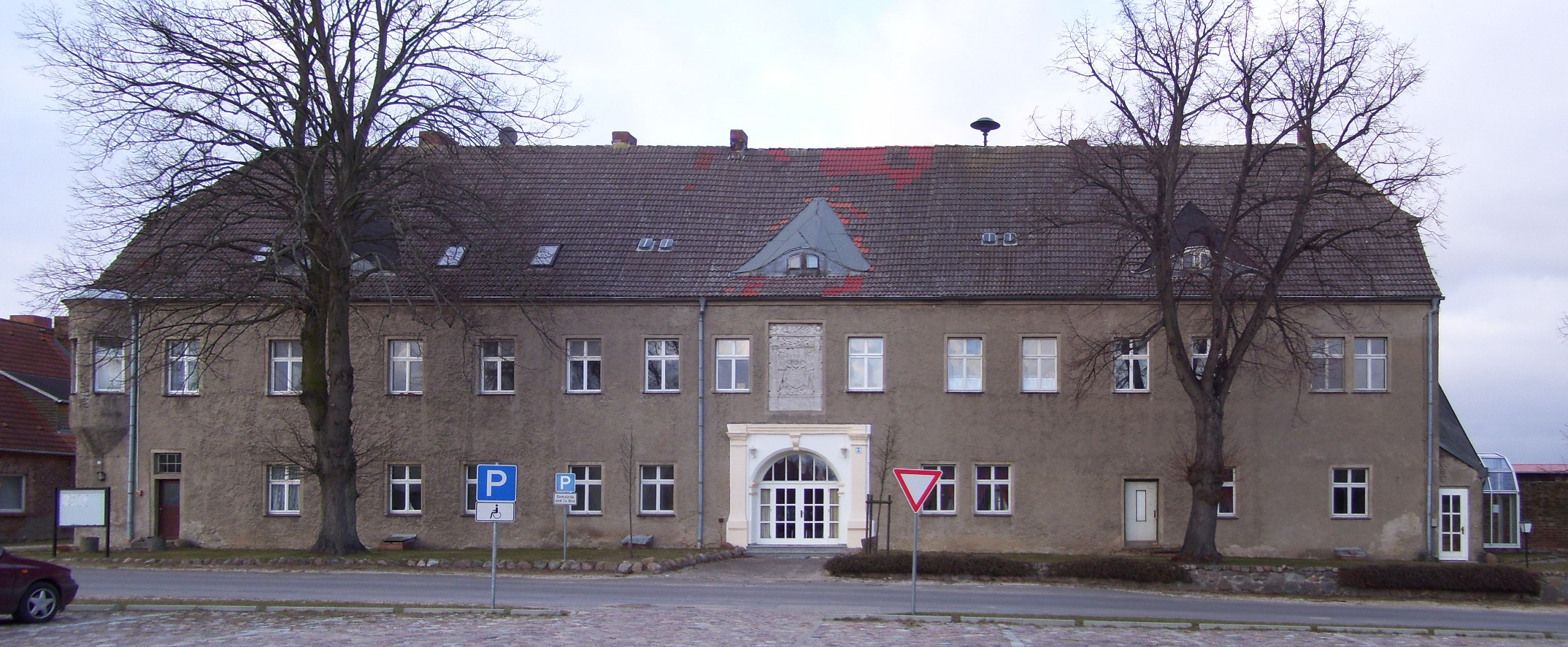 Schloss Pudagla auf Usedom, Landkreis Ostvorpommern, Mecklenburg-Vorpommern